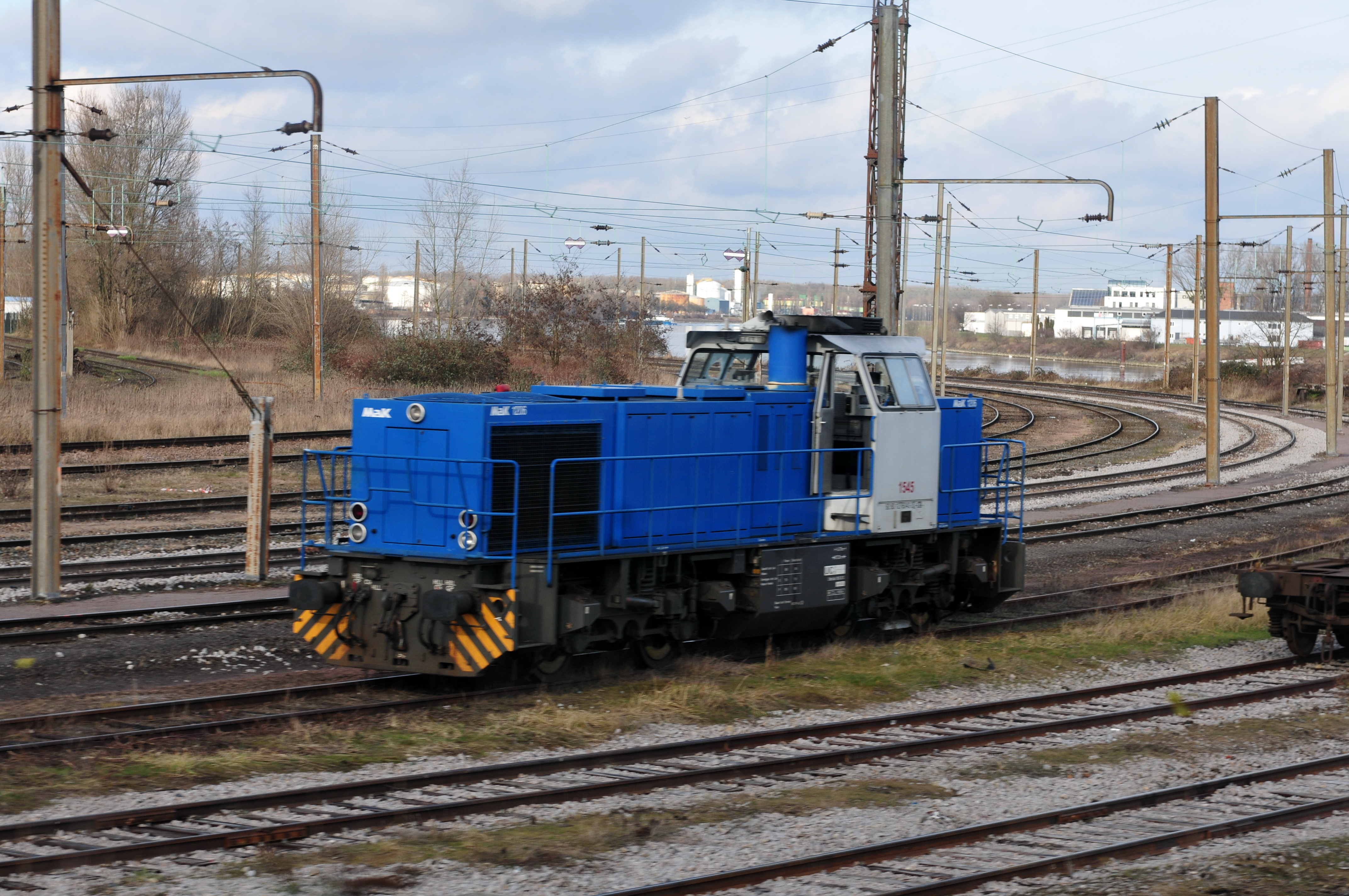 Straßburg European Parliament 2014 3.–7. February 2014, StrasbourgThis photo has been created within the project "WIKI loves parliaments / European Parliament". Usage and Help If you have any questions concerning this picture or how to use it, feel free to